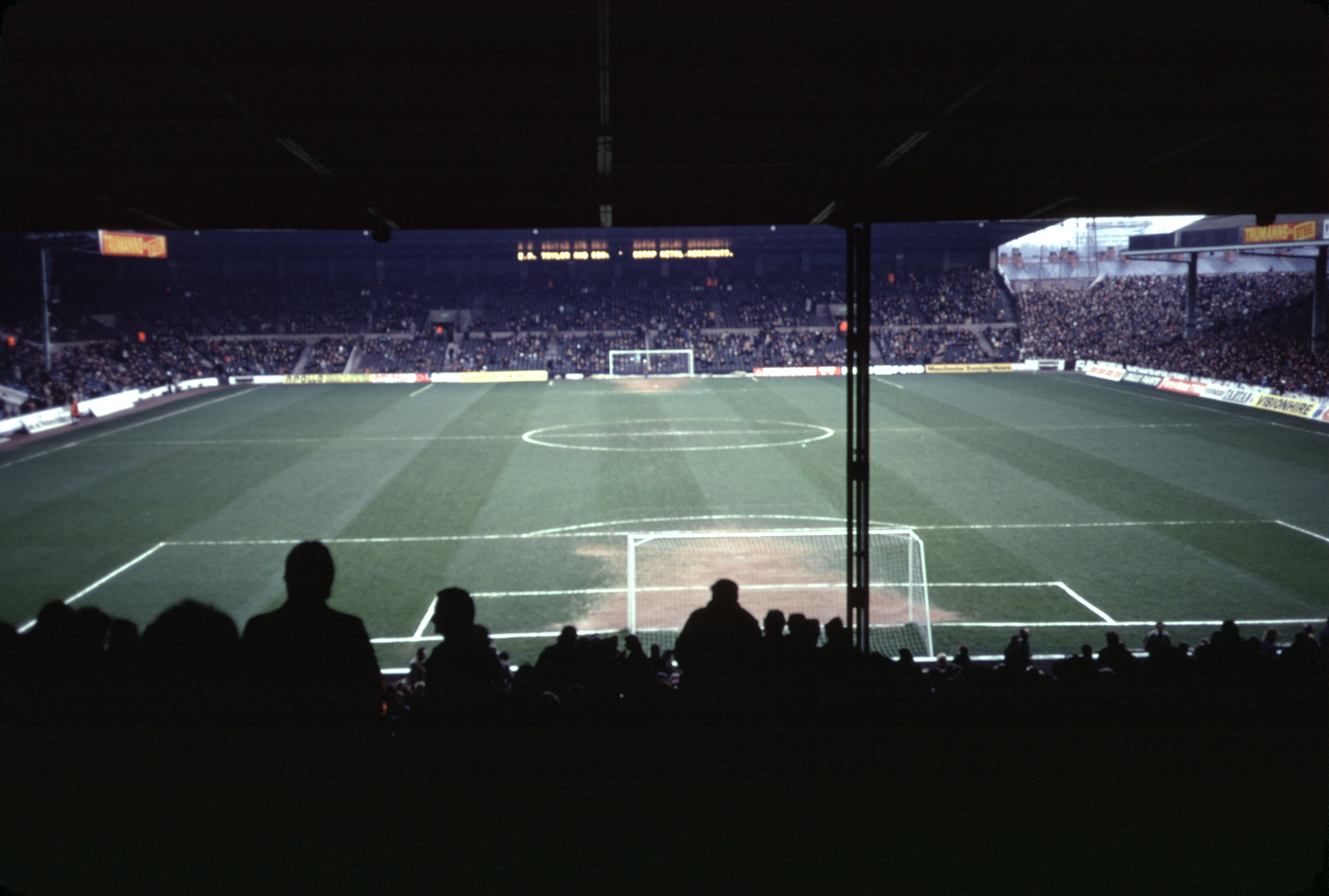 Maine Road in December 1975, probably Man City v Derby County on the 27th of December.